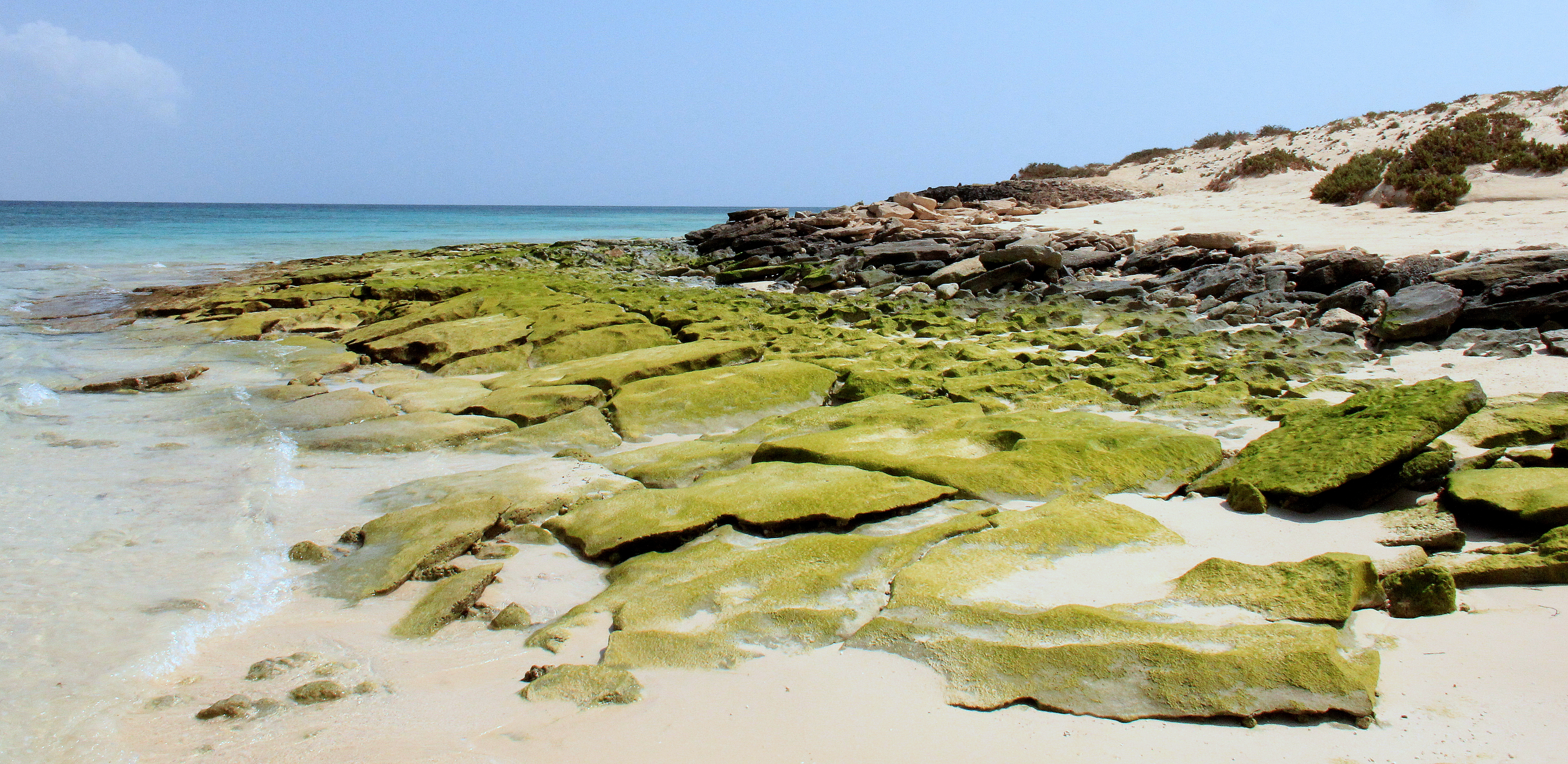 Dumsok Island جزيرة دمسك